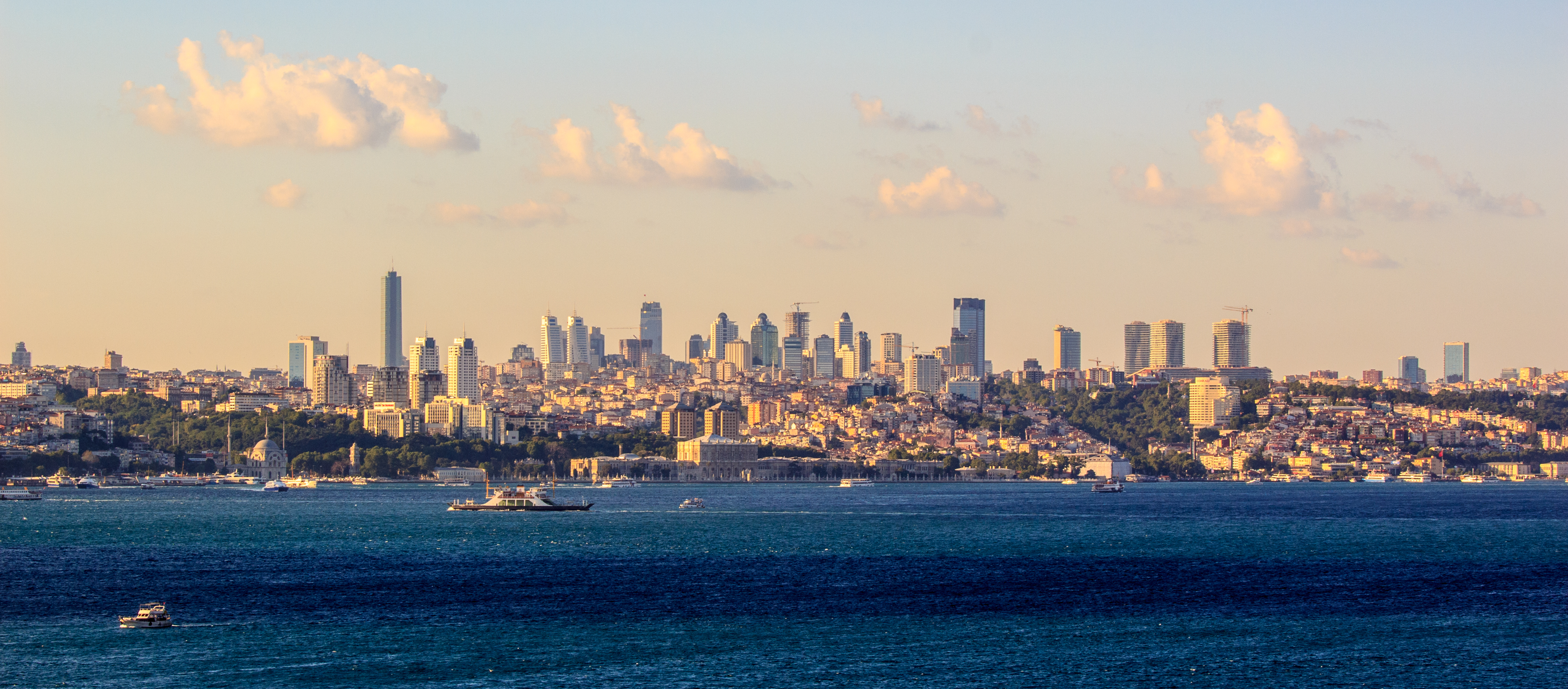 Modern Istanbul skyline at sunset